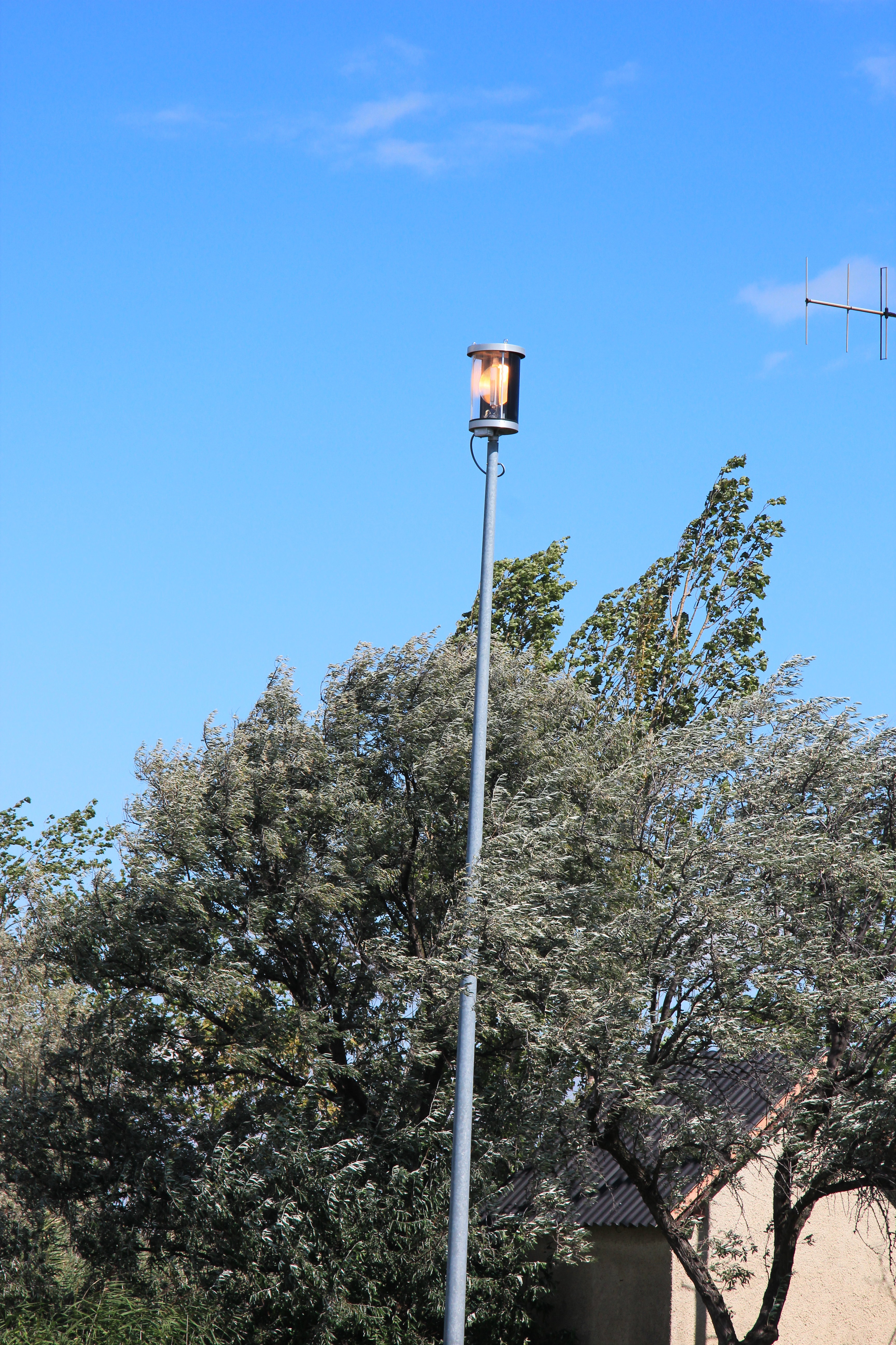 Blitzlampe für Sturmwarnung am Neusiedler See